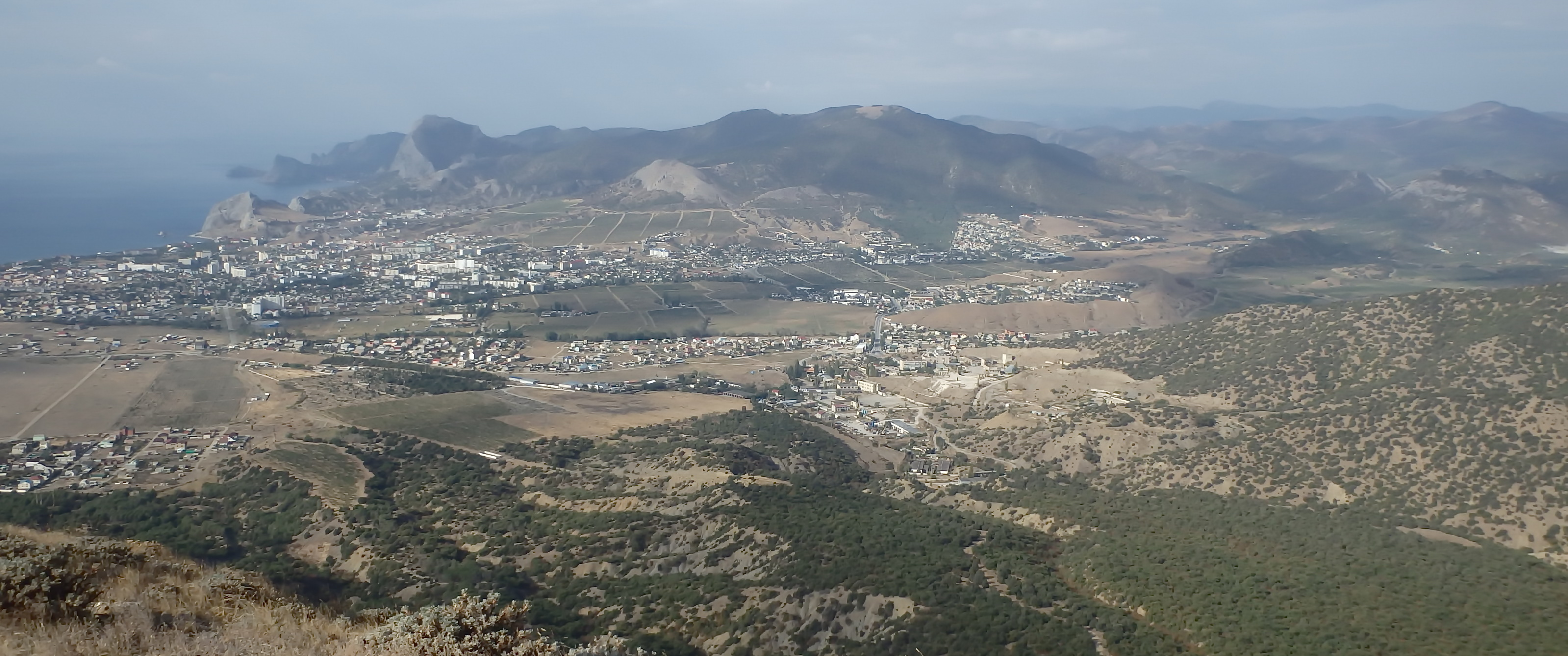 Вид на Судак с вершины Ай-Георгий